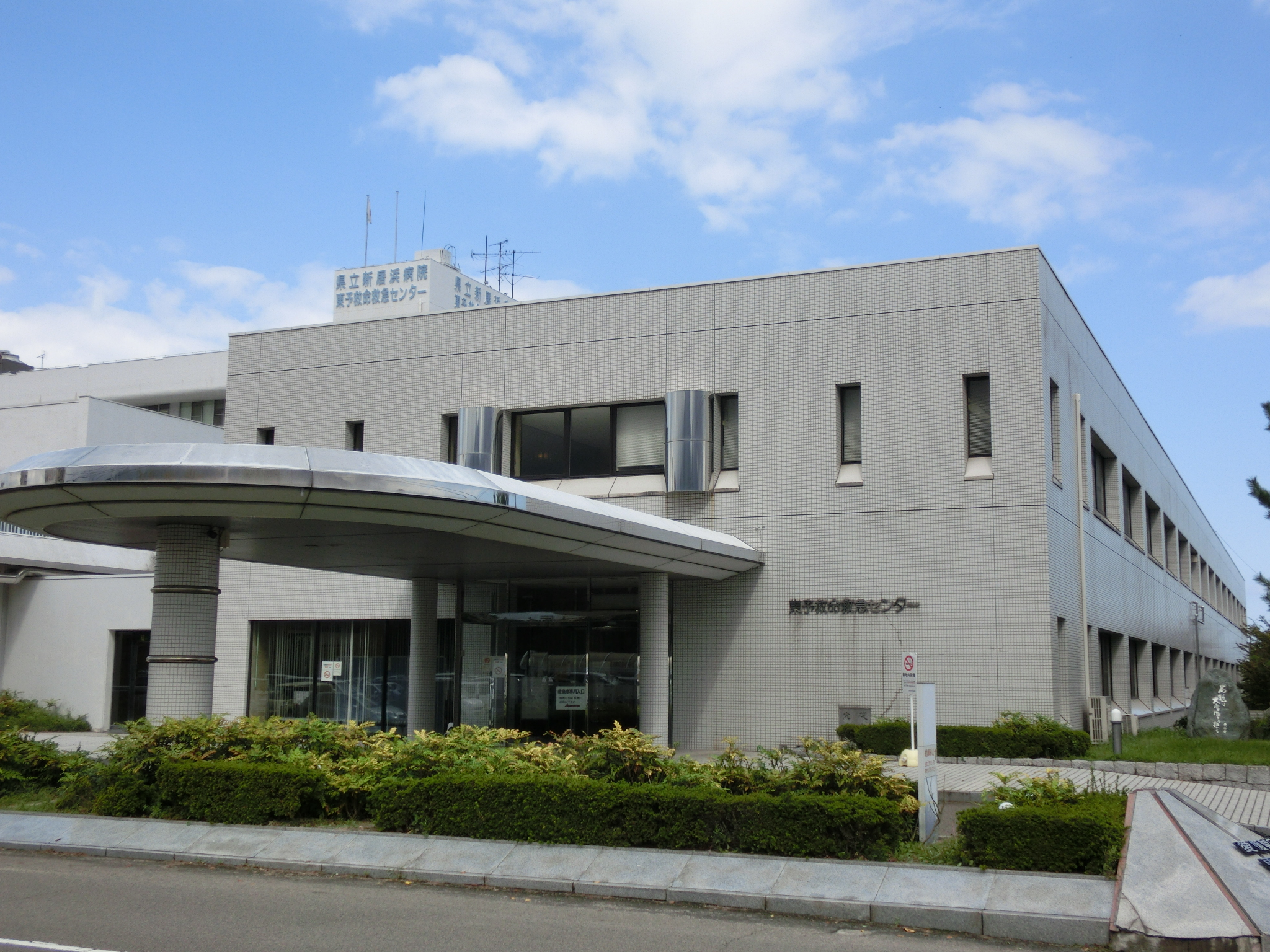 愛媛県立新居浜病院